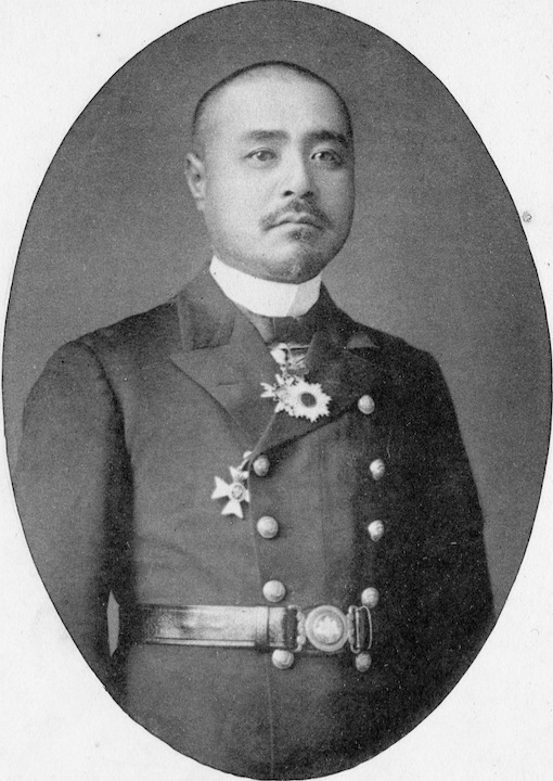 栃内曽次郎海軍大将